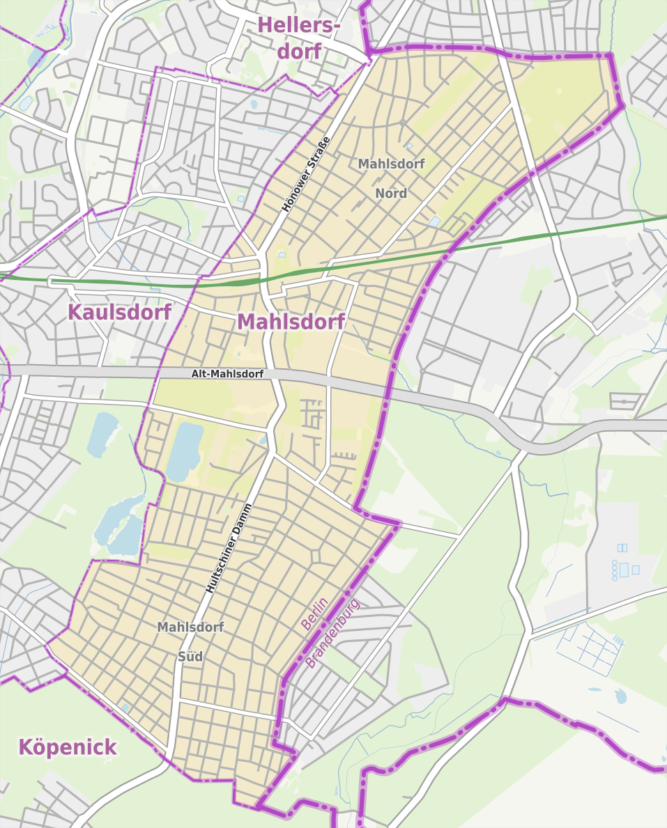 Übersichtskarte der Straßen und Ortslagen in Berlin-Mahlsdorf